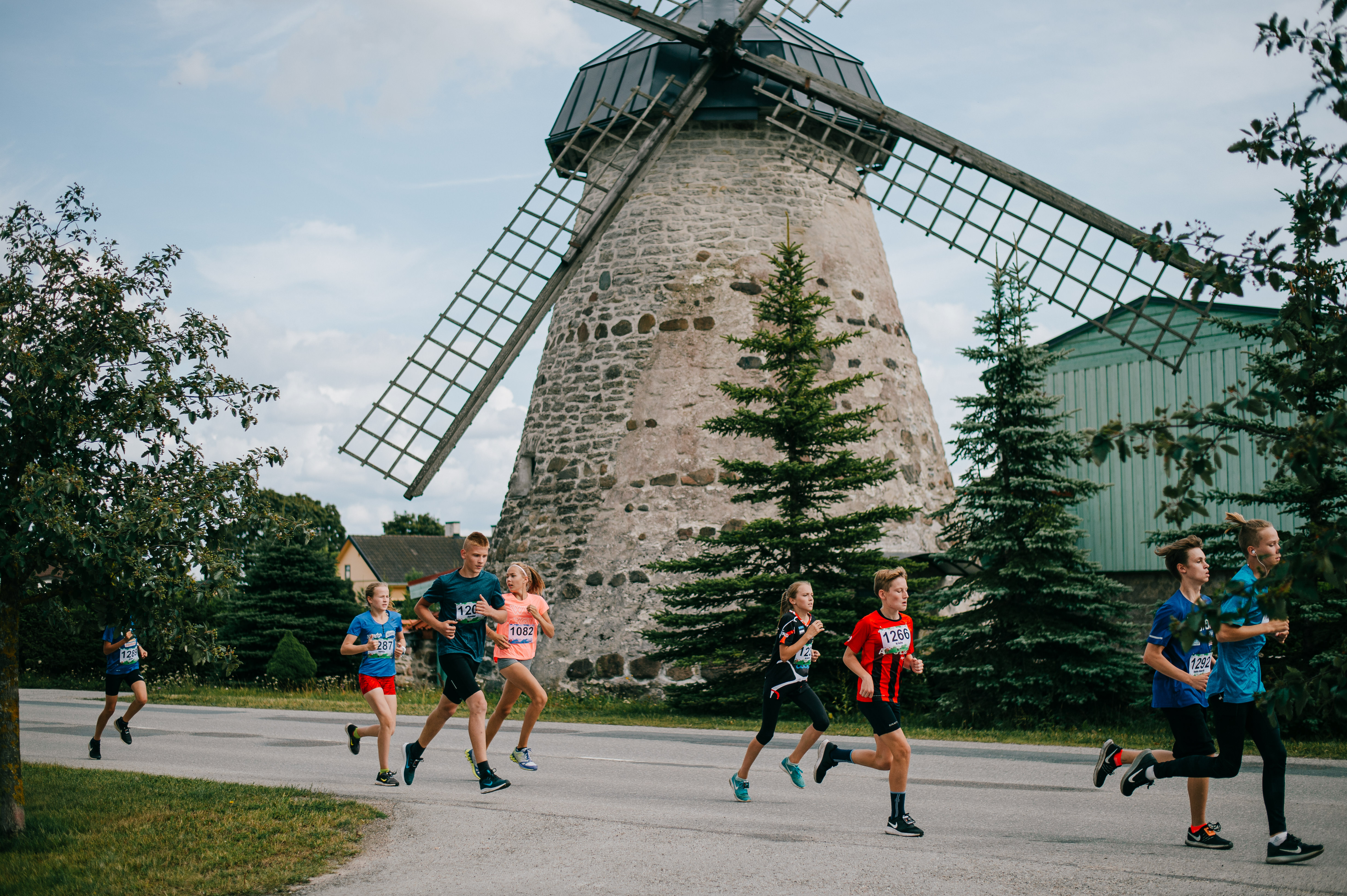 Peetri Jooks